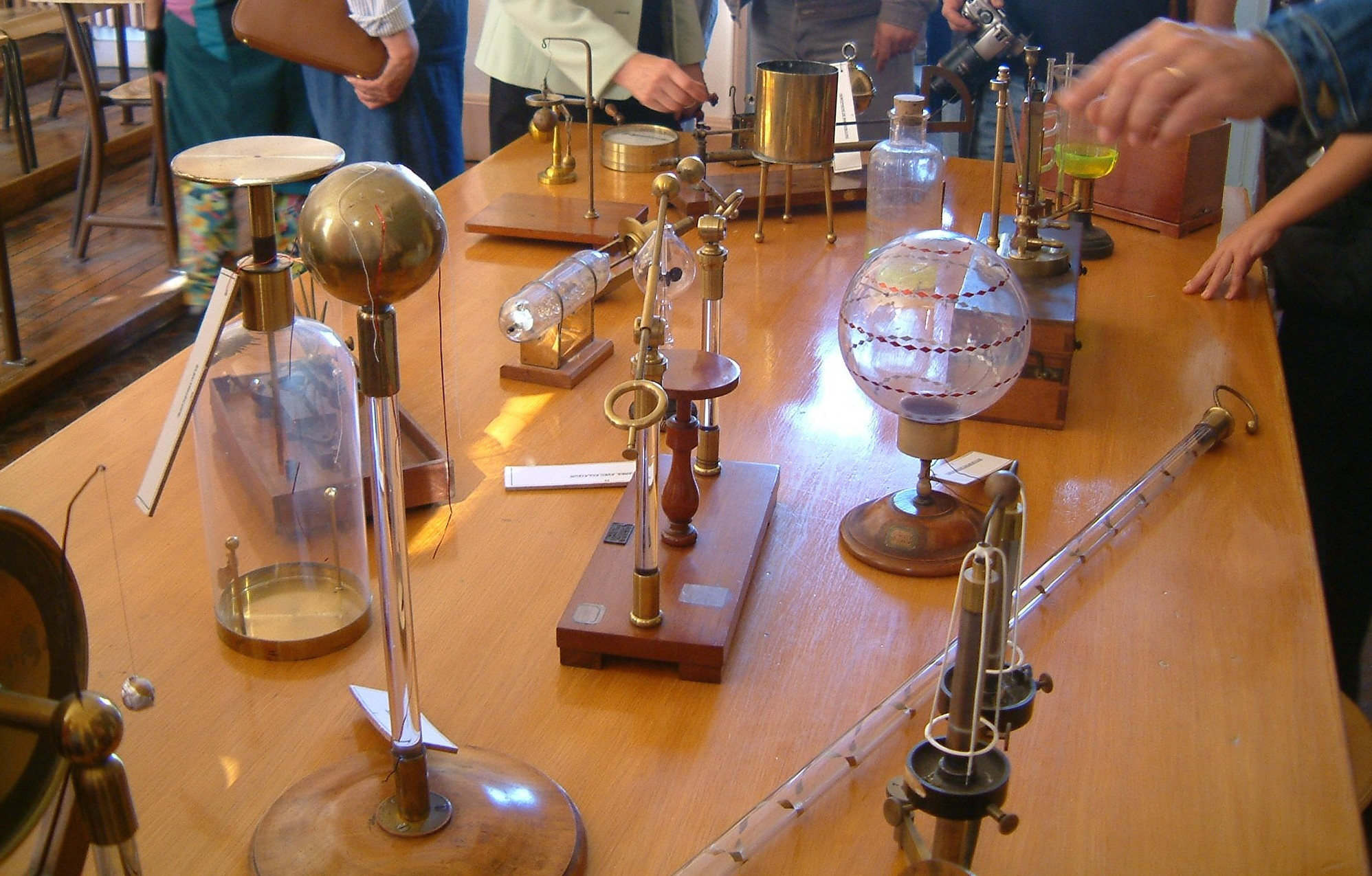 Collection d'instruments scientifiques, Lycée Carnot, Dijon, FRANCE.